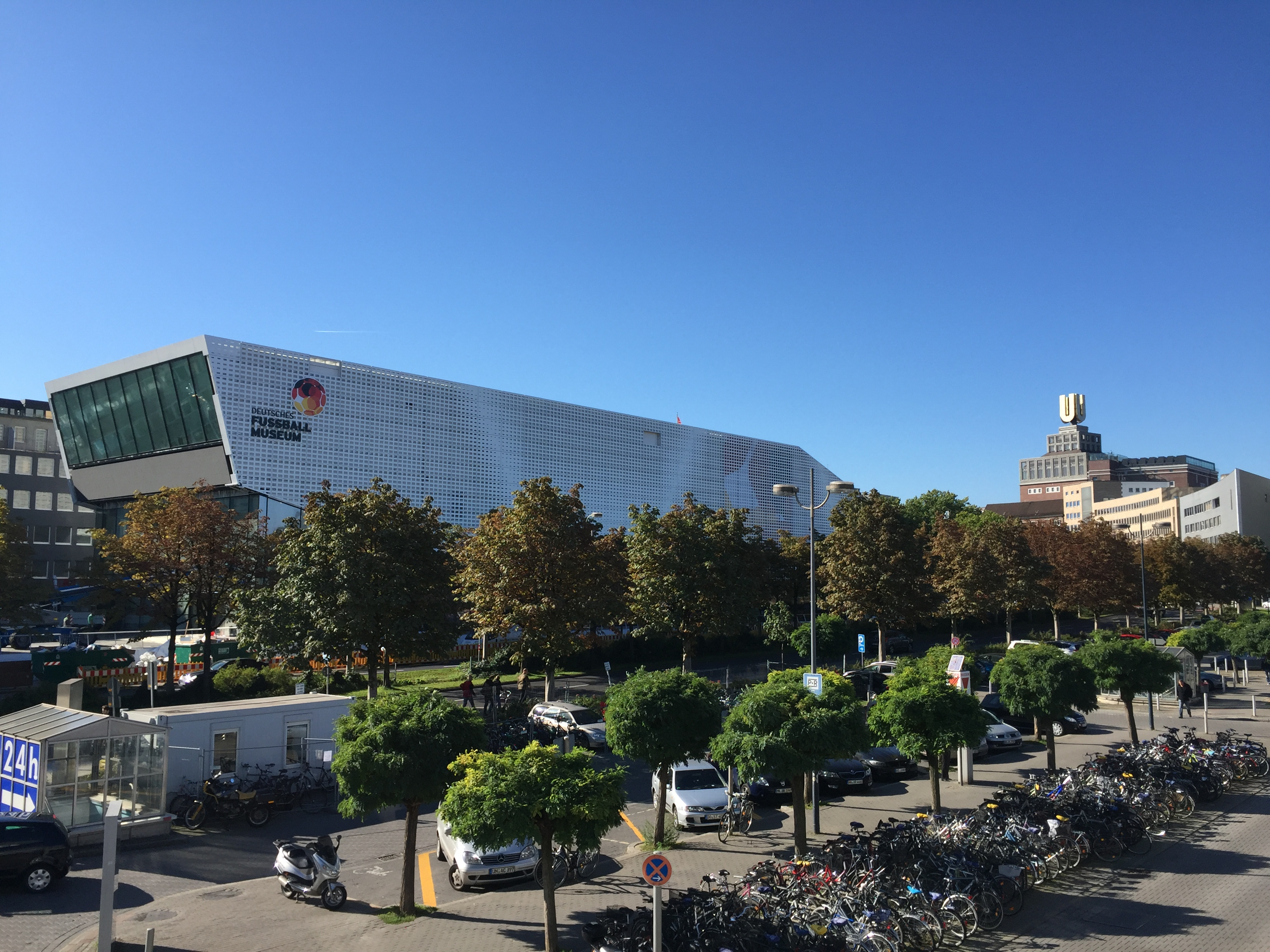 Blickrichtung Königswall